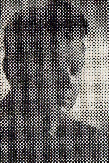 Zdzisław Wojdylak - polski hokeista na trawie. Zm. 1987.